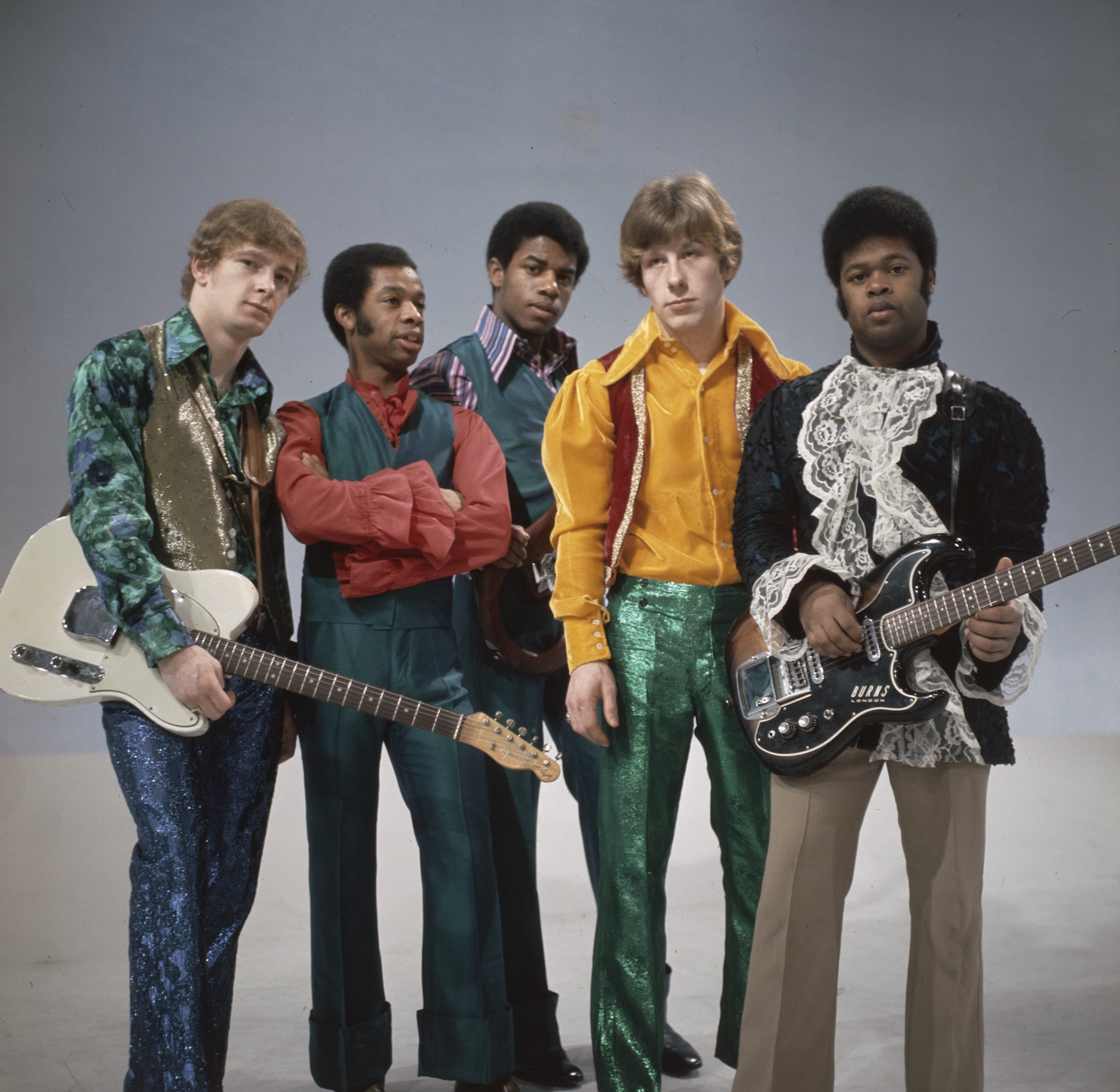 TV programma Moef Ga Ga; The Equals (Engelse beatgroep)